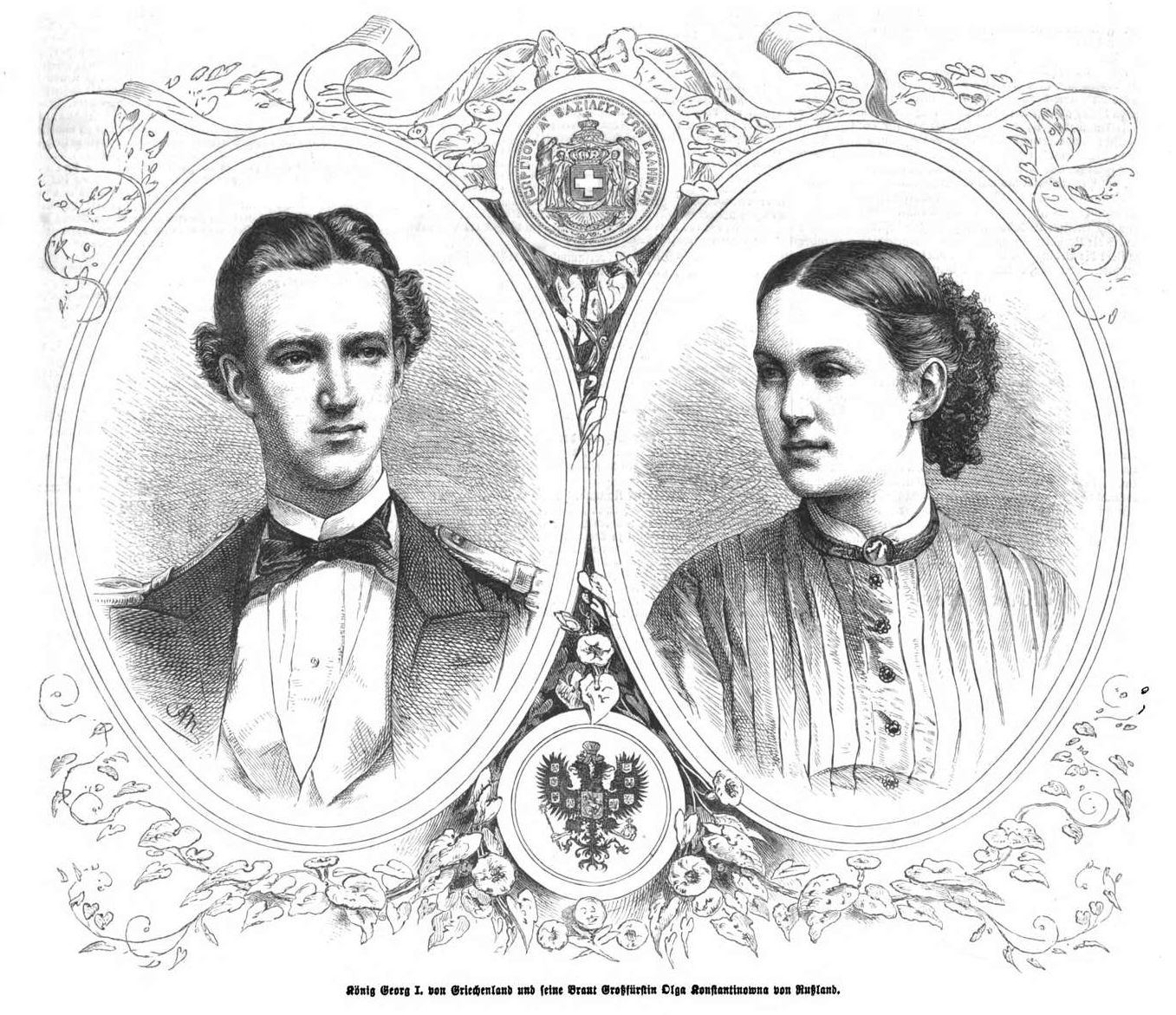 König Georg I. von Griechenland und seine Verlobte Großfürstin Olga Konstantinowa, 1867, zur Zeit ihrer Verlobung.